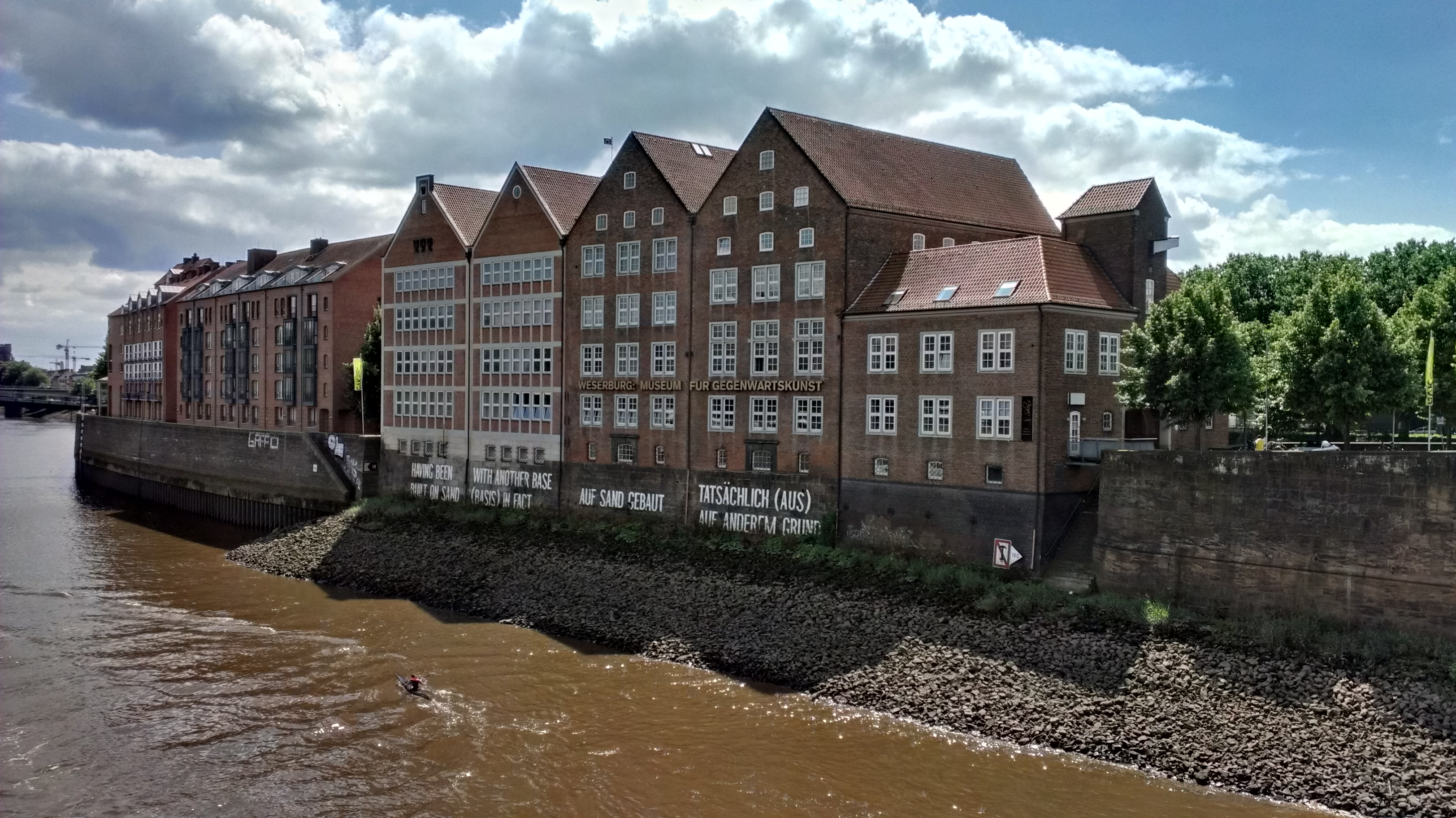 Nordansicht der Weserburg, Museums für moderne Kunst